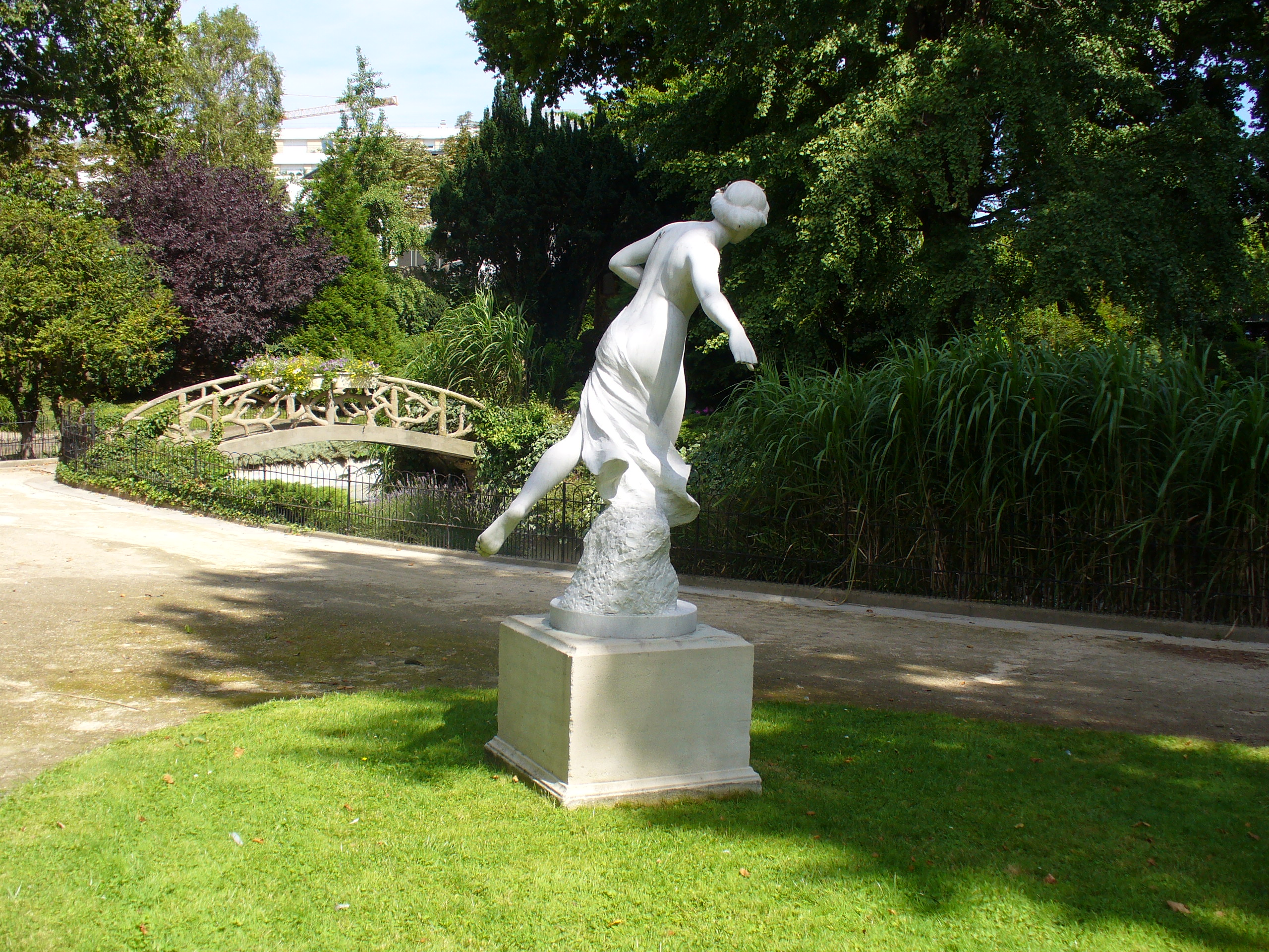 Square Voyer d'Argenson, à Asnières-sur-Seine (92)